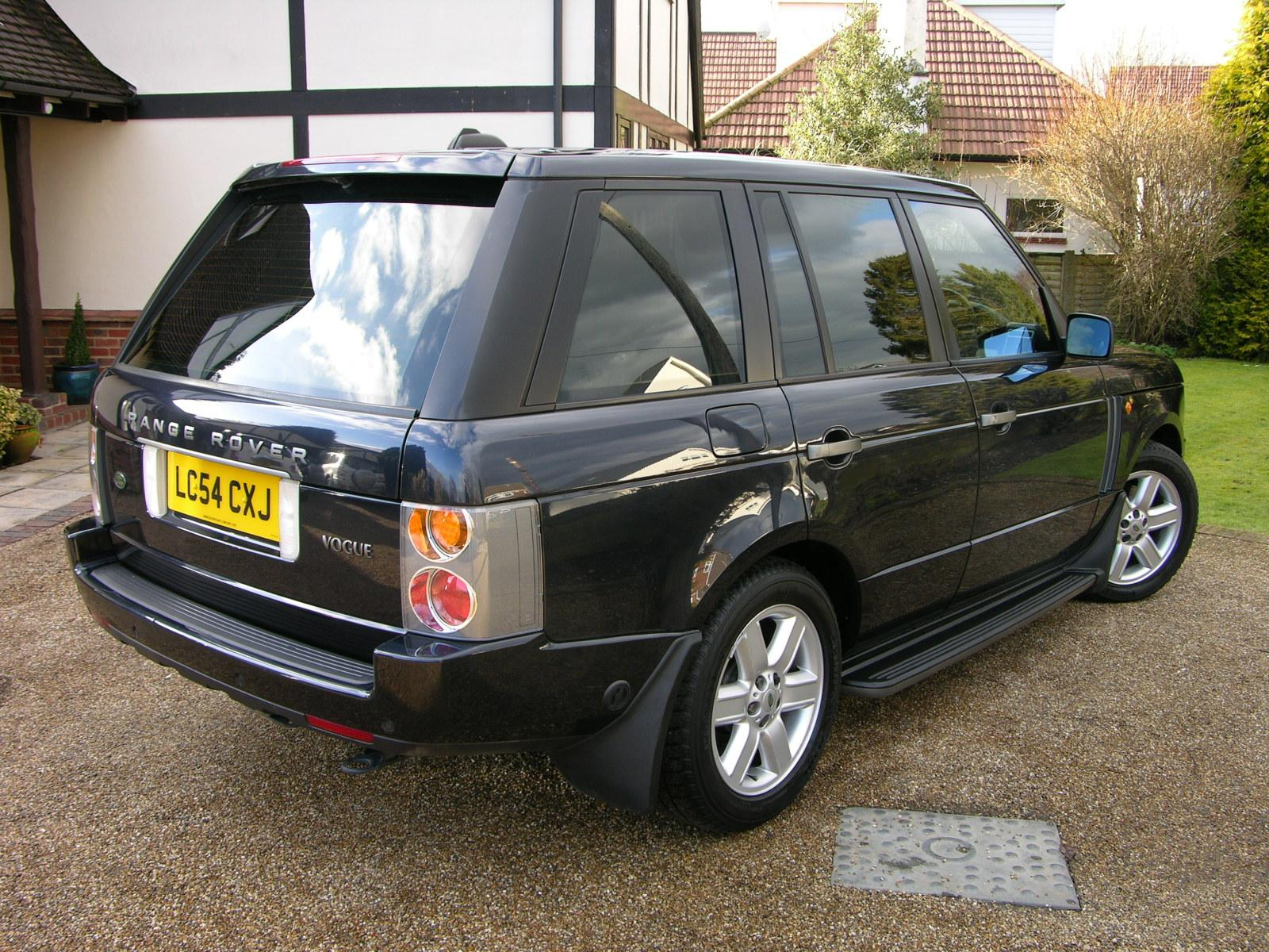 2004 Range Rover V8 Vogue LPG